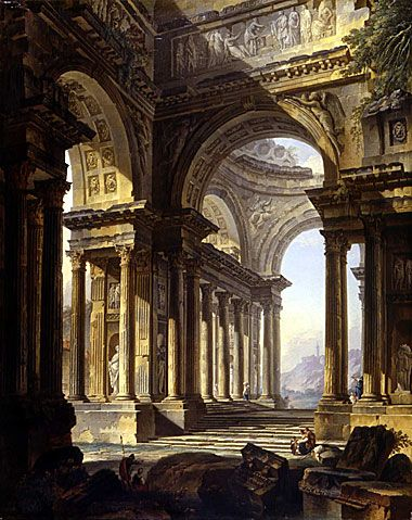 Cette peinture d'architecture est la synthèse de deux genres, la scénographie ou l'art des décors ingénieux et complexes, dont Servandoni, le maître de Demachy, était alors le spécialiste incontesté, et les ruines idéales, popularisées par Pannini, qui devaient avoir une influence si grande sur le développement du paysage dans la deuxième moitié du XVIIIe siècle avec, entre autres, Hubert Robert. Cette ruine imaginaire, vue depuis une perspective fuyante, devient ainsi l'unique sujet du morceau de réception et l'artiste est jugé sur sa virtuosité et sa faculté d'impressionner le spectateur. Demachy sera nommé plus tard professeur de perspective à l'Académie.